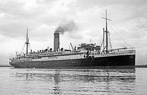 Il piroscafo Wandilla, in servizio sulle linee australiane, poi "Fort St. George", "Cesarea" ed infine "Arno"